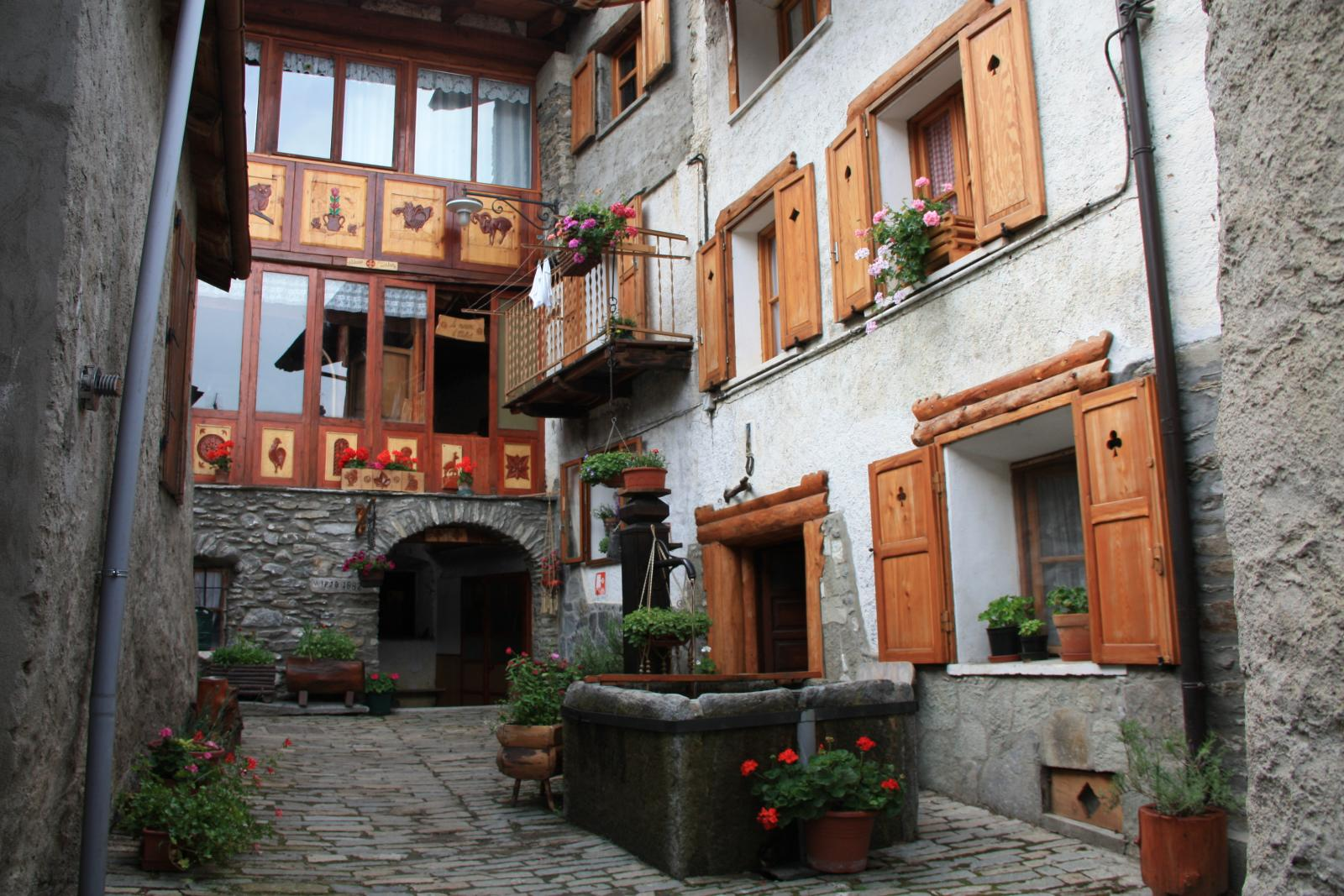 Laux (Val Chisone)